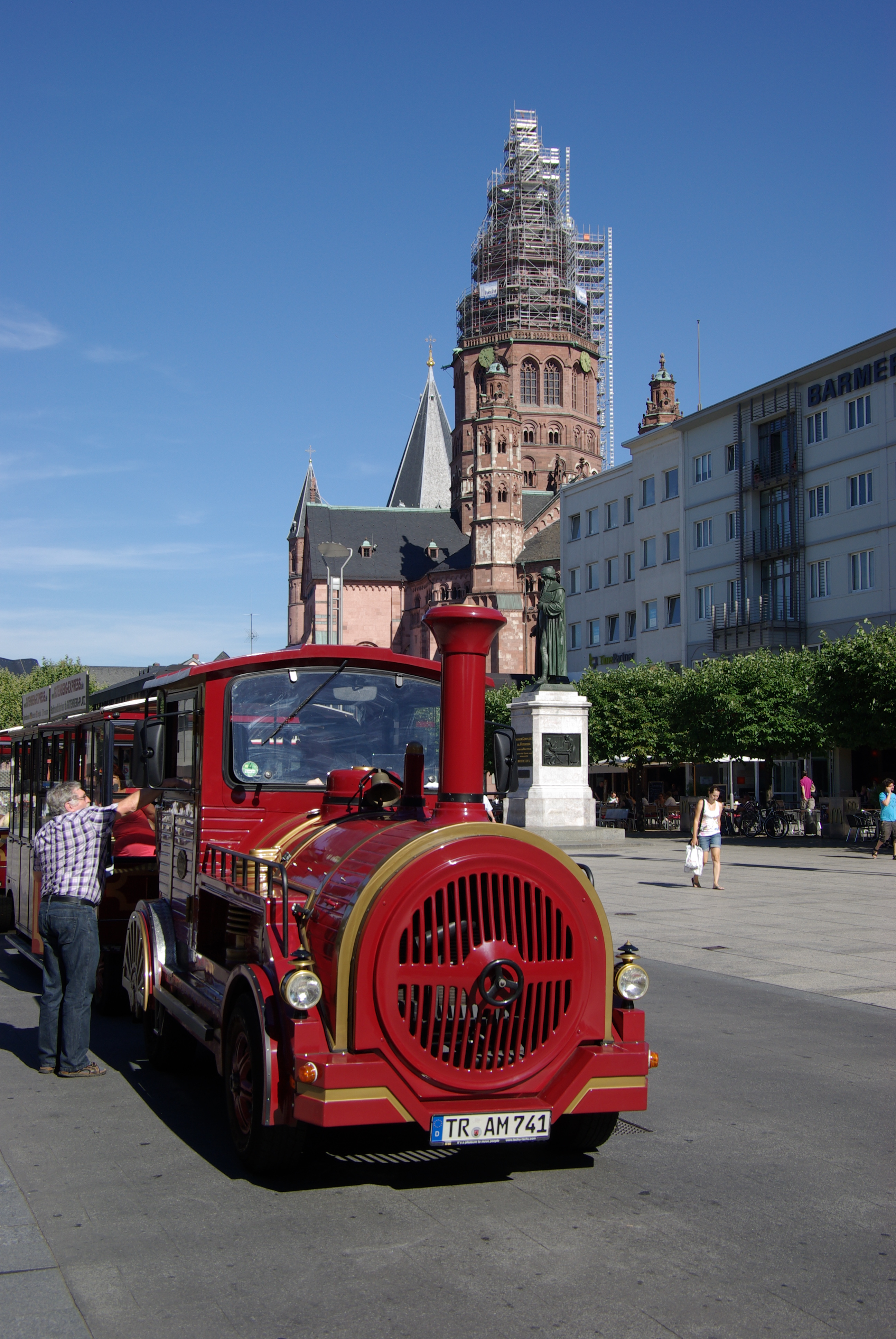 Mainz, "Tram" am Gutenbergplatz